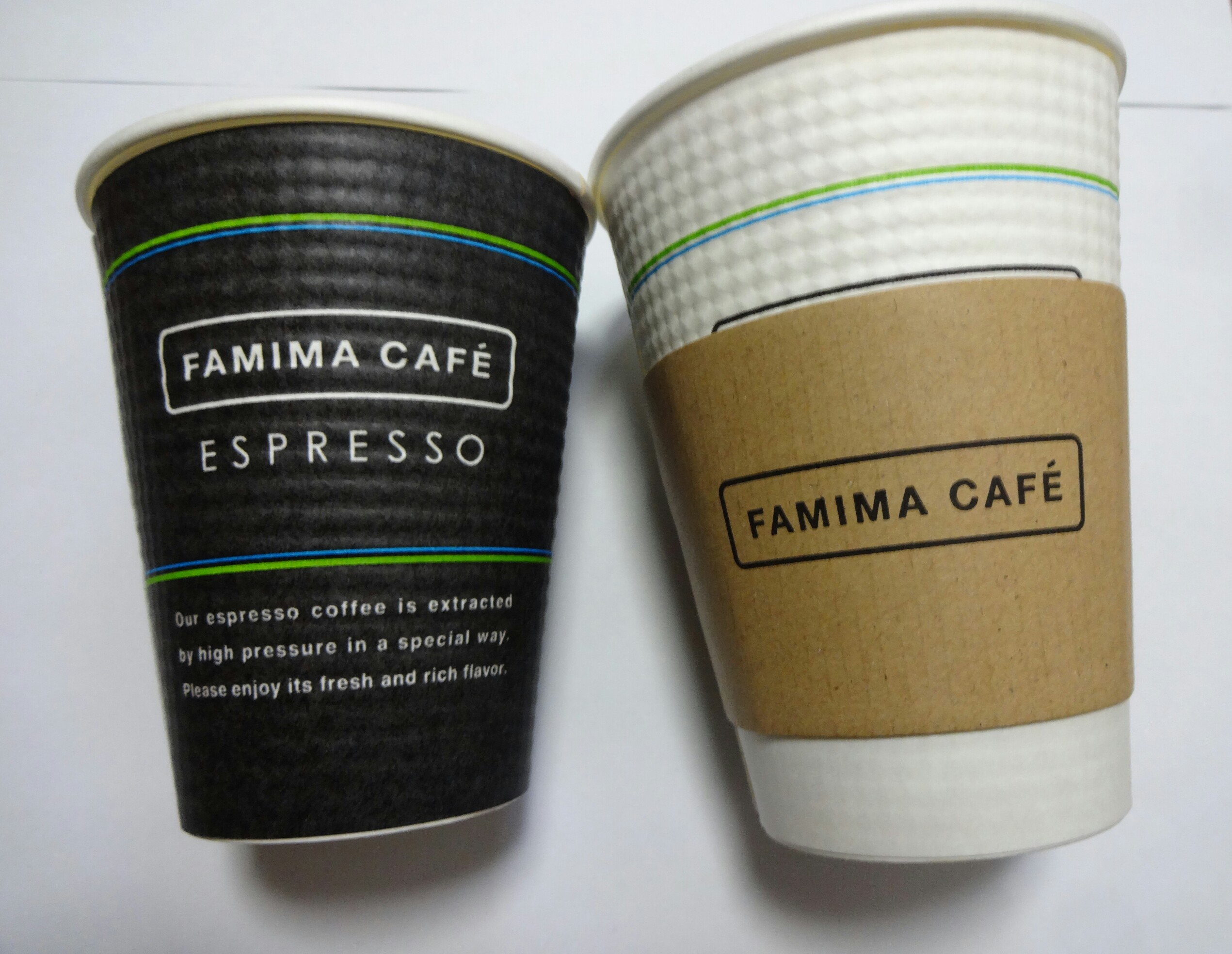 コンビニコーヒー（ファミマカフェ）のカップ。左：Sサイズ、右：Mサイズ・スリーブ付き。